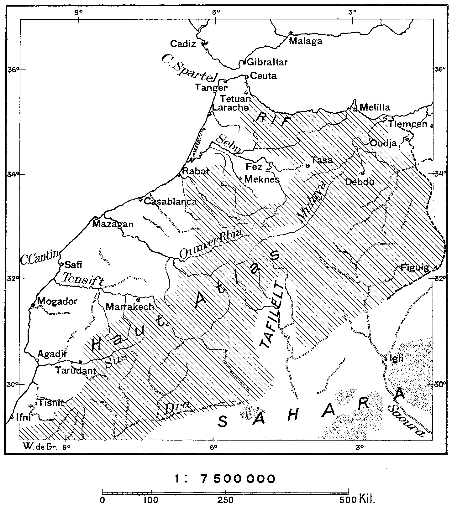 N° 467. Le Maroc du Sultan et le Bled es Siba.